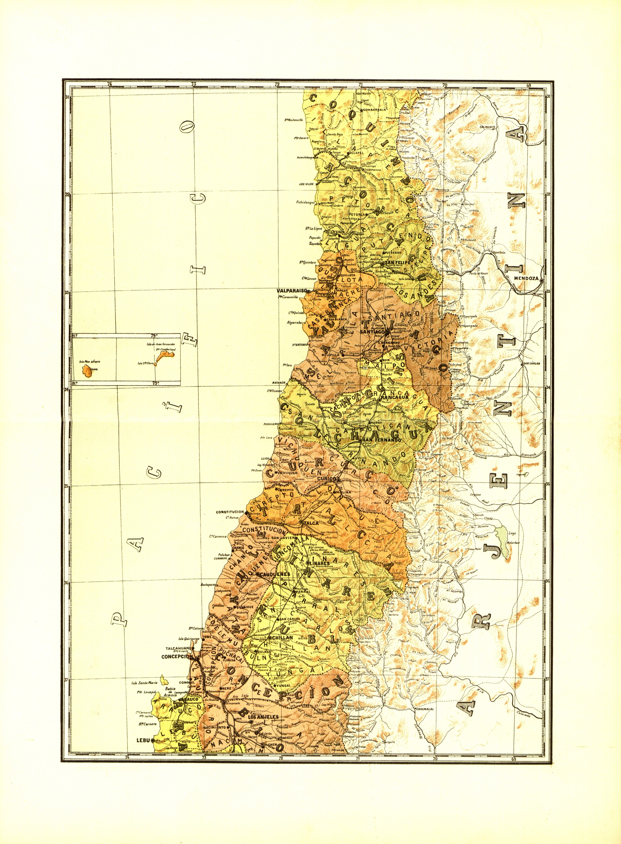 Mapa de Chile 1904 publicada por Carlos Tornero en Chile descripción física, política, social industrial y comercial de la república de Chile